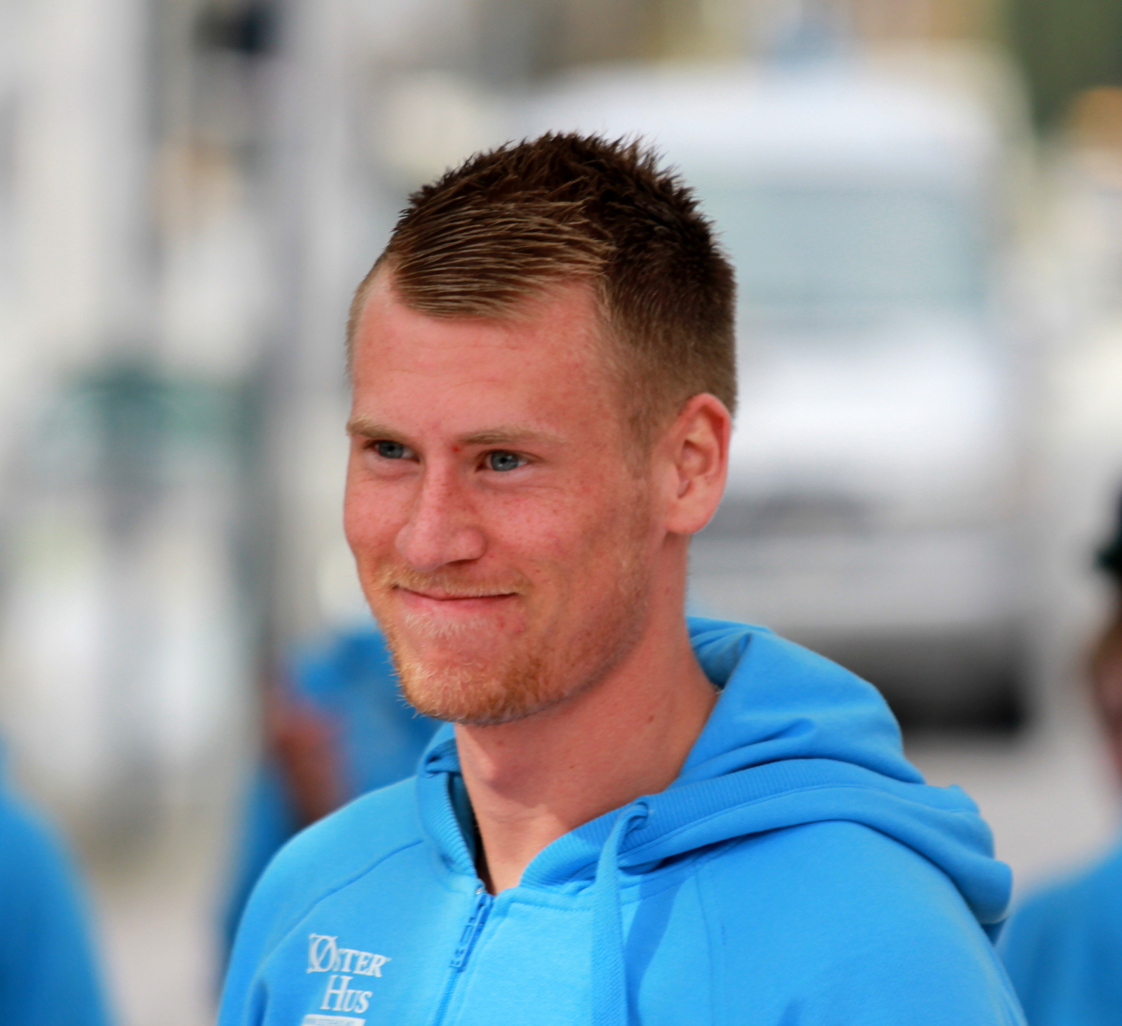 Kent Håvard Eriksen foran 2014 sesongen for Sandnes Ulf